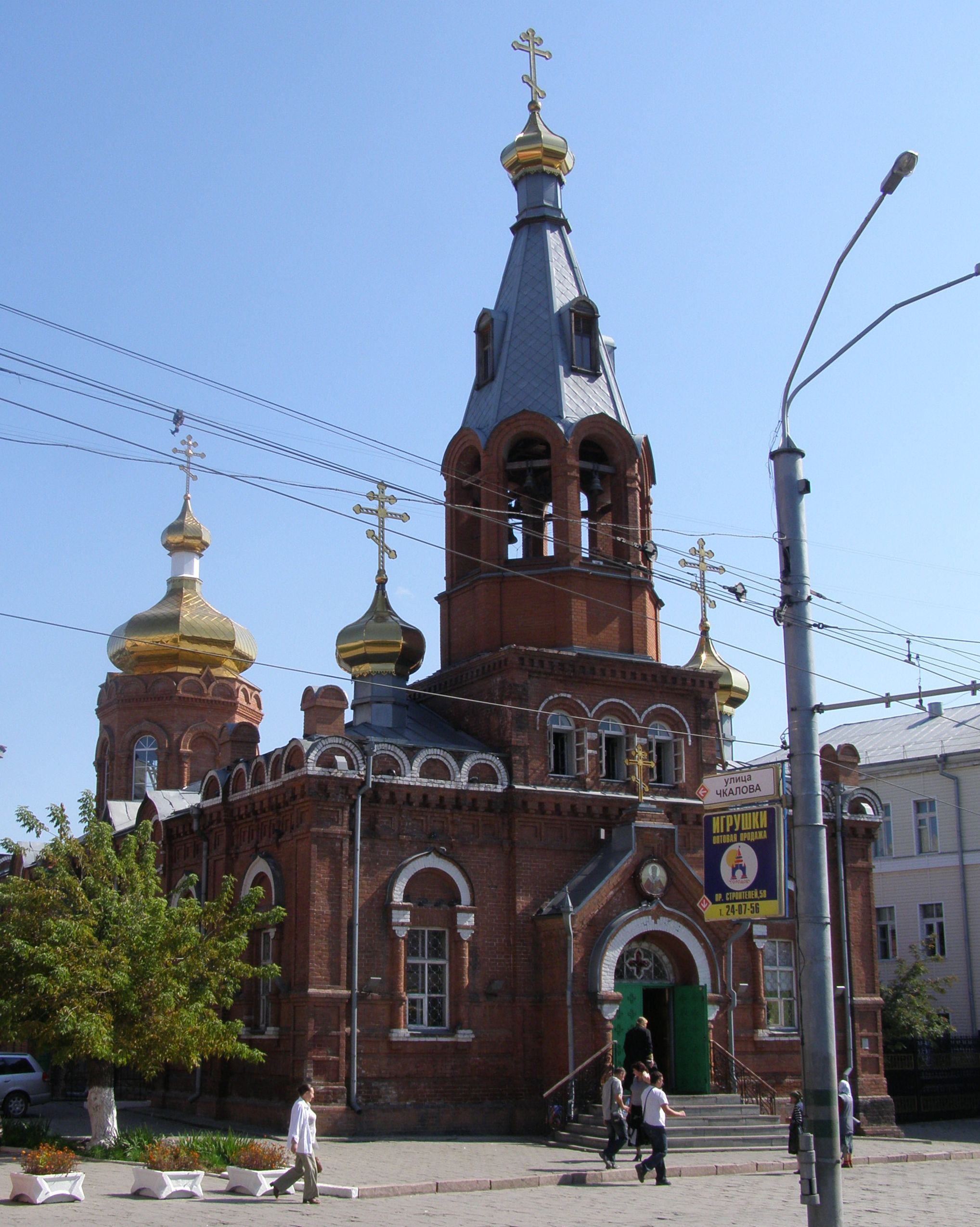 Никольская церковь (Барнаул)